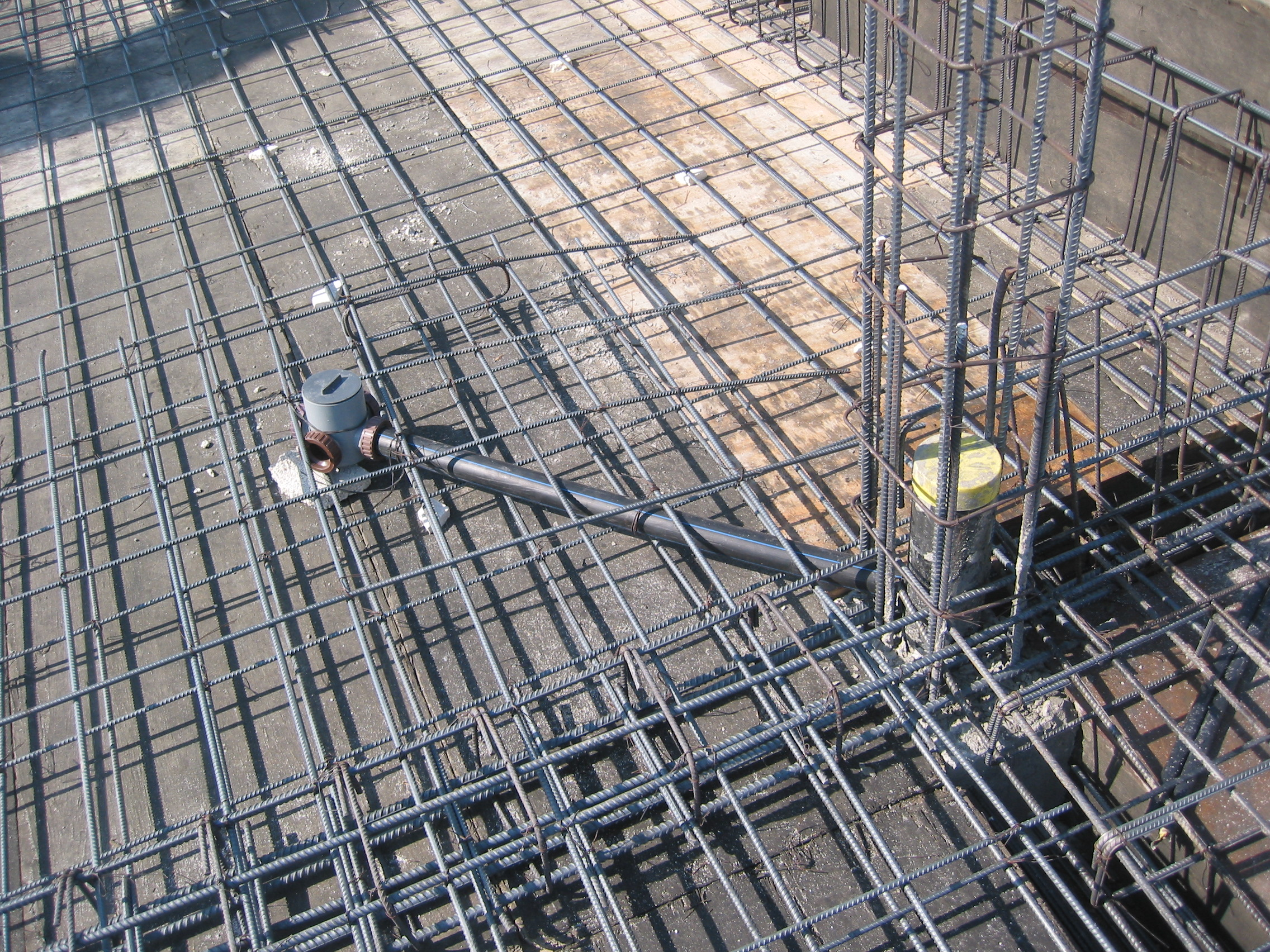 צנרת ביוב המונחת בין מוטות הפלדה לפני יציקת הבטון.